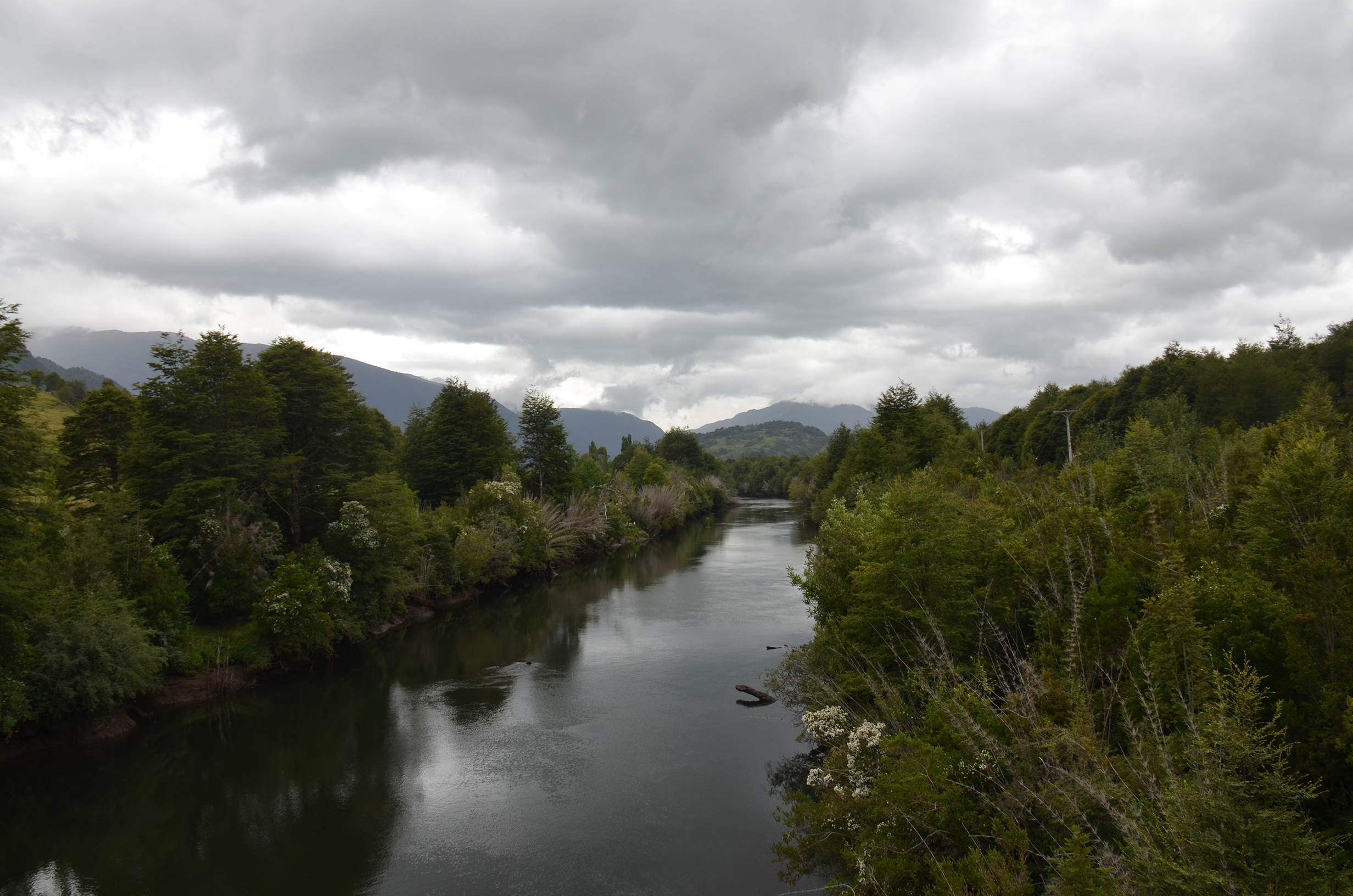 Rio Los Palos